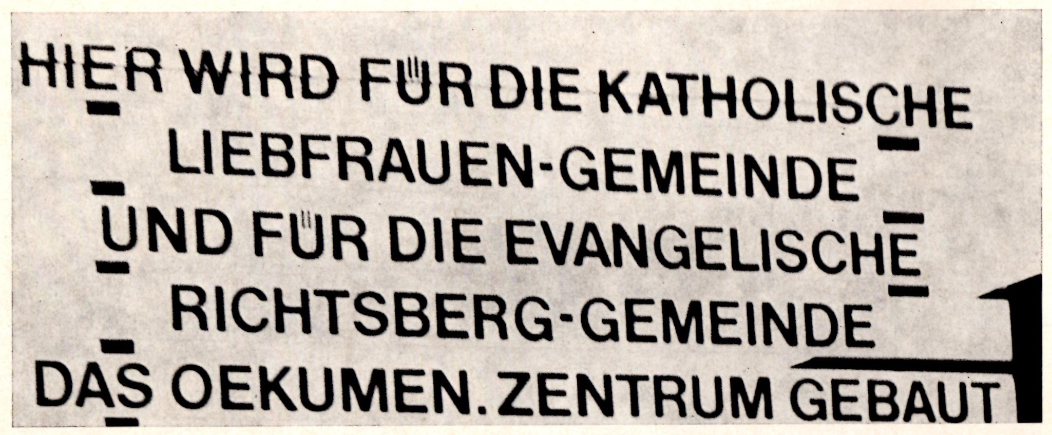 Bauschild des Ökumenischen Zentrums Thomaskirche in Marburg (1973).